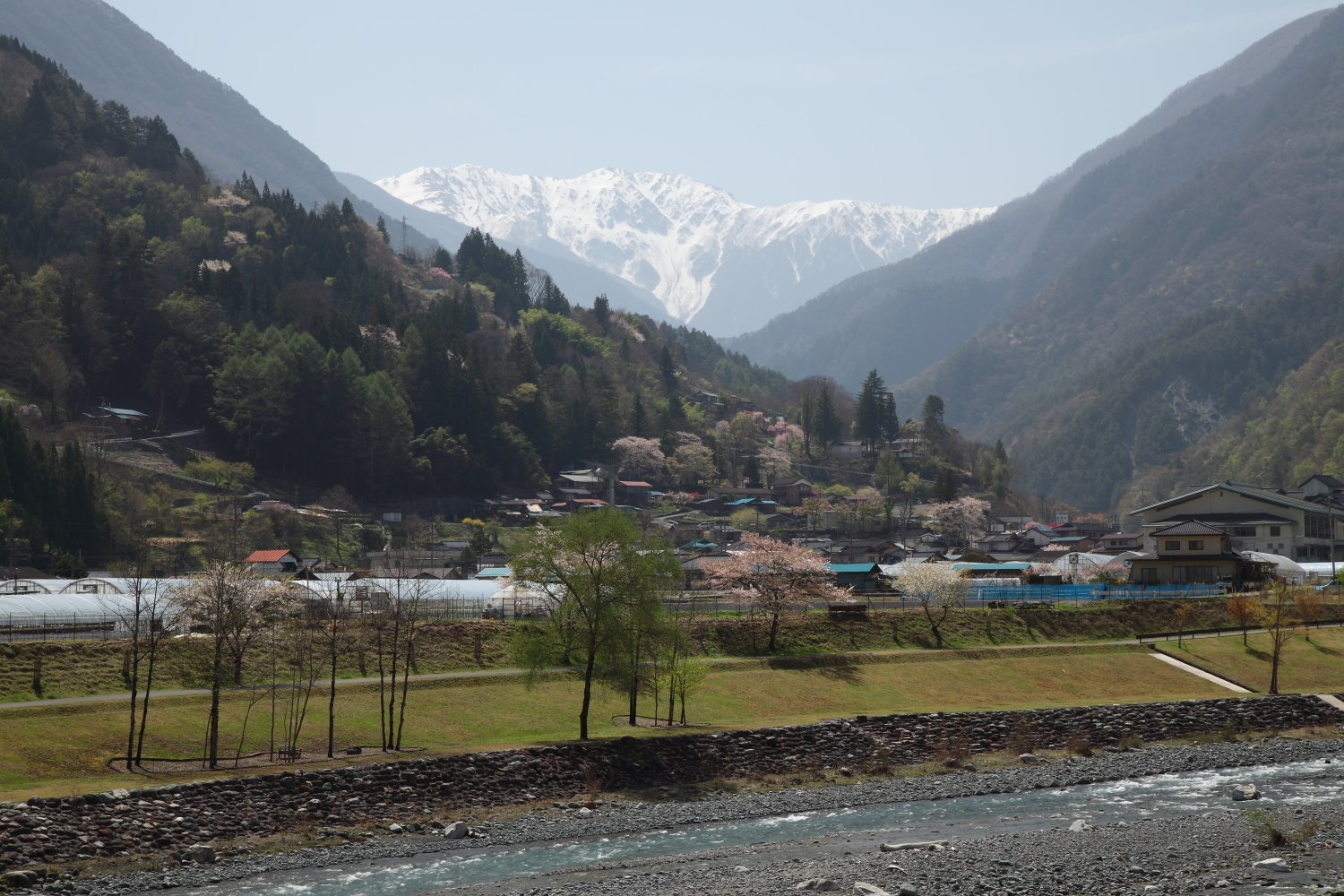 赤石岳を望む（下伊那郡大鹿村、2012年）